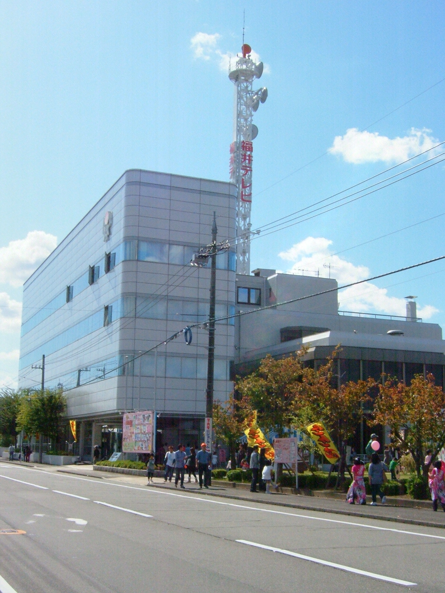 福井テレビジョン放送本社（福井県福井市）